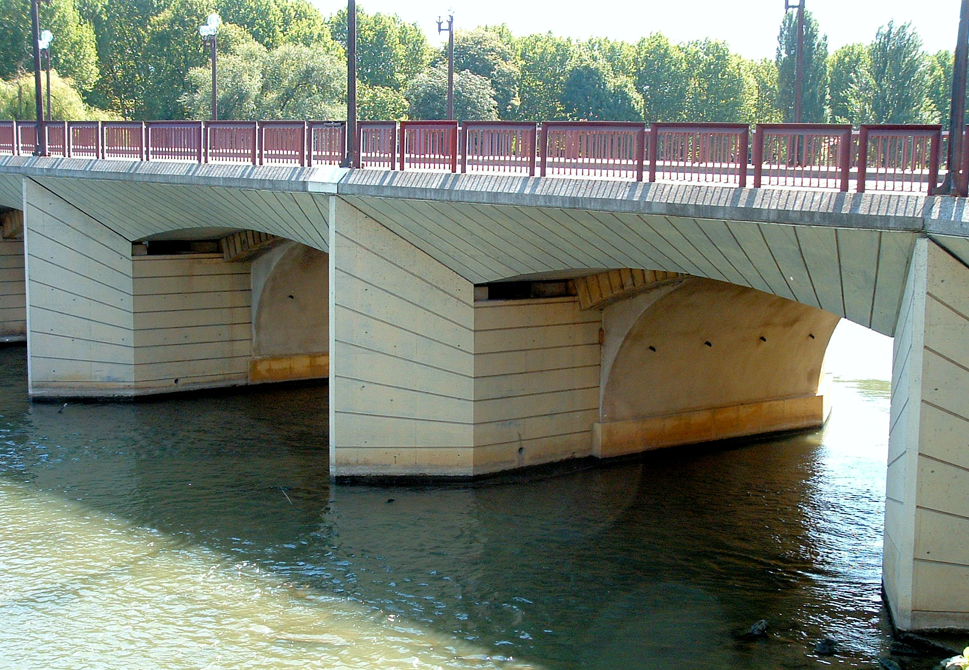 Metz - Pont de Thionville - Elargissement vers l'aval en 1989